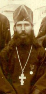 Иеромонах Антоний (Миловидов)